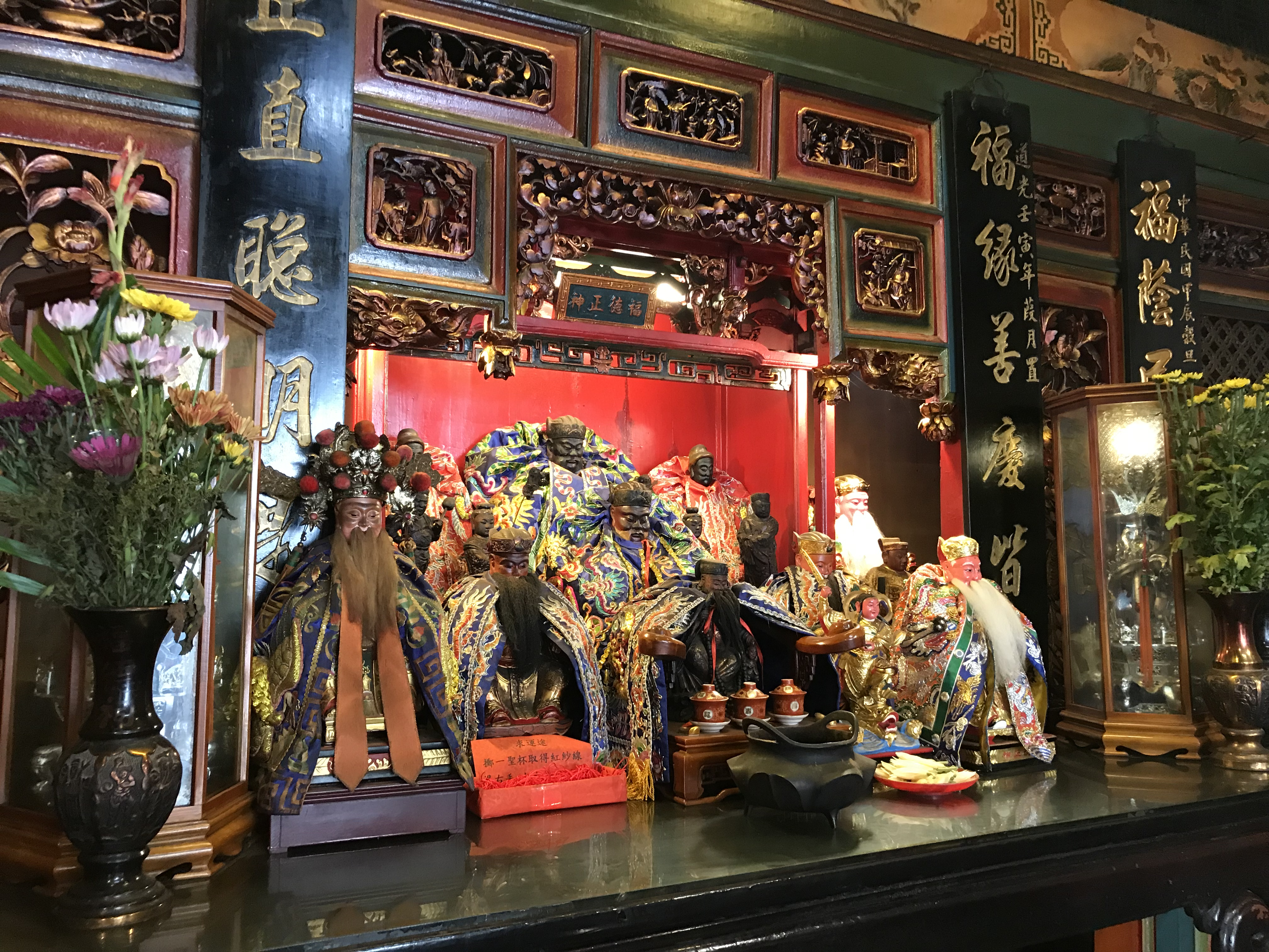 鹿港福德祠神像